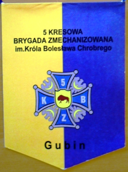 Pamiątkowy proporczyk